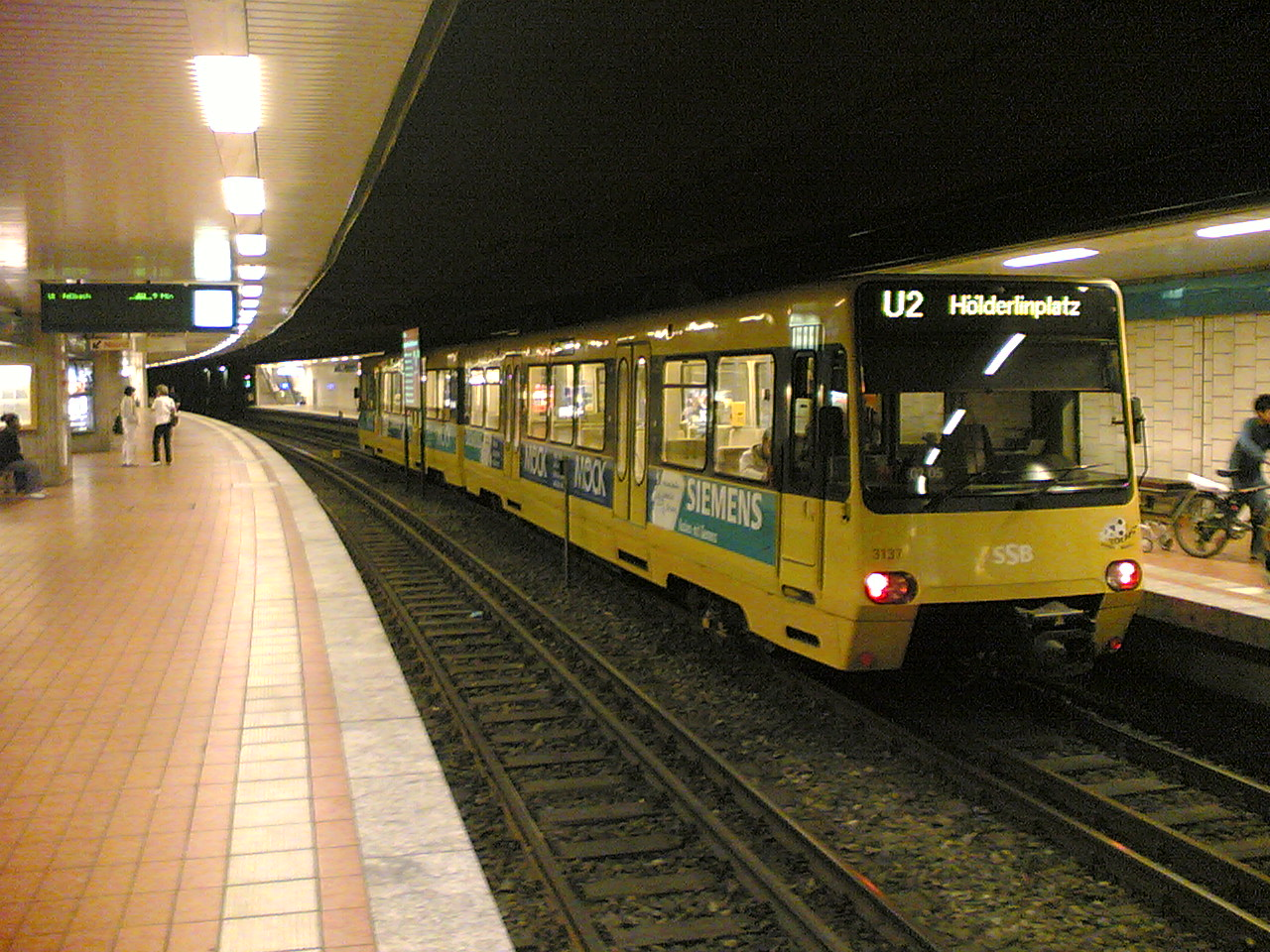 Stuttgart Underground Station Rathaus